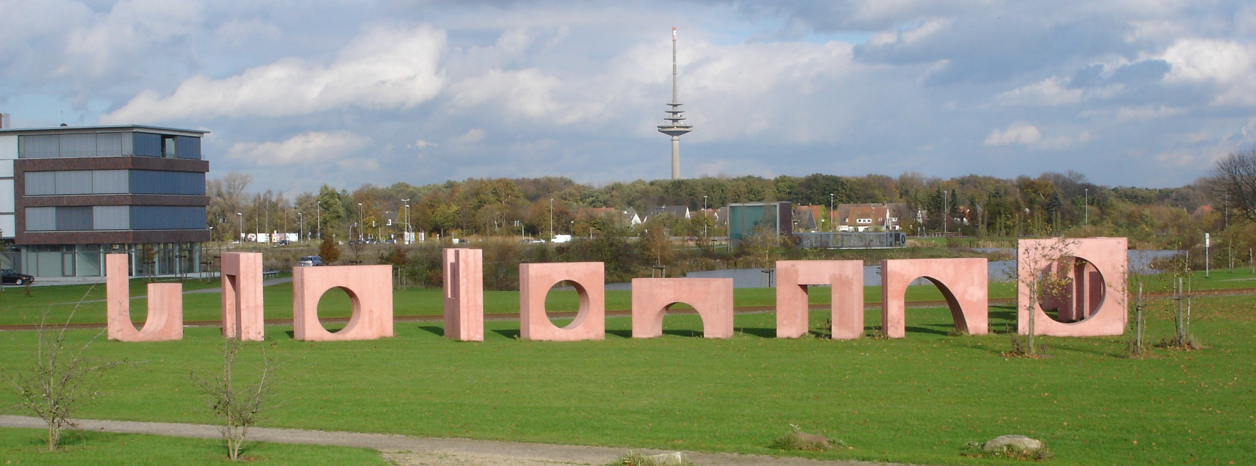 Loddenheide the city of Münster (Westphalia), Germany: Sculpture "Die alte Schießmauer" by Gabriele Staarmann in the "Friedenspark"